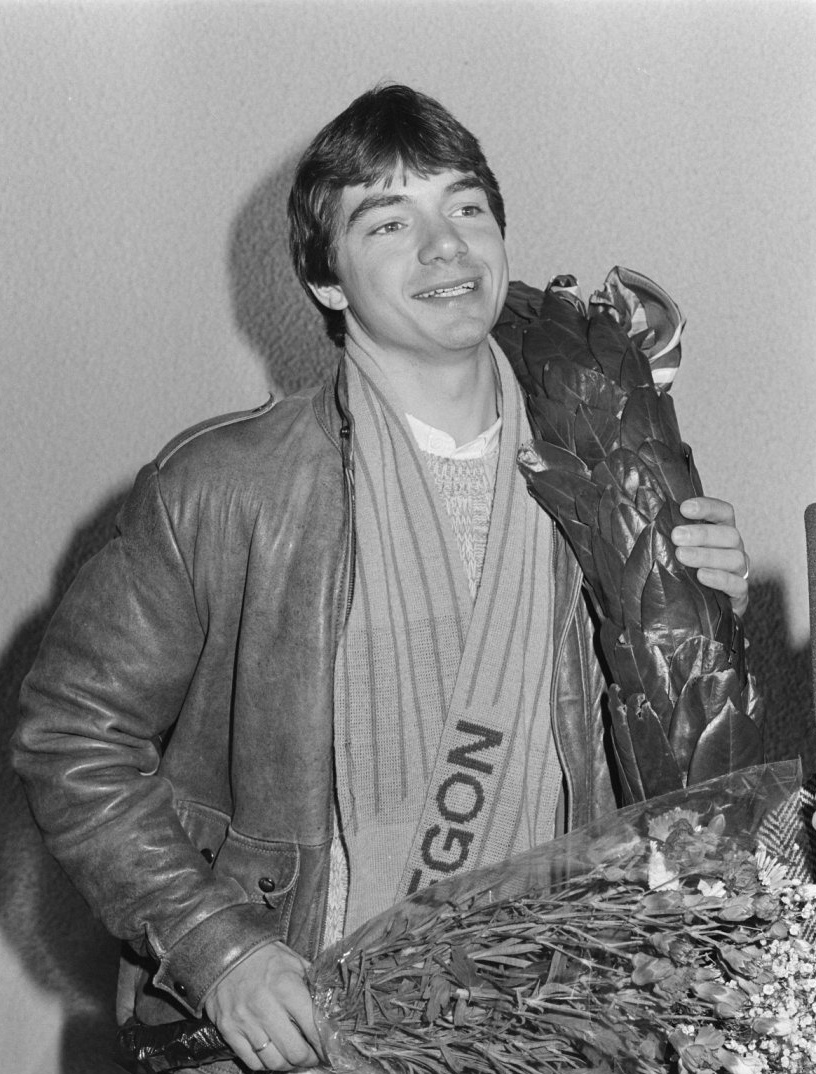 Hein Vergeer